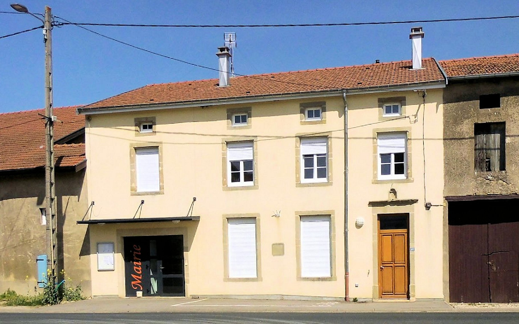 La mairie de Dombasle-en-Xaintois